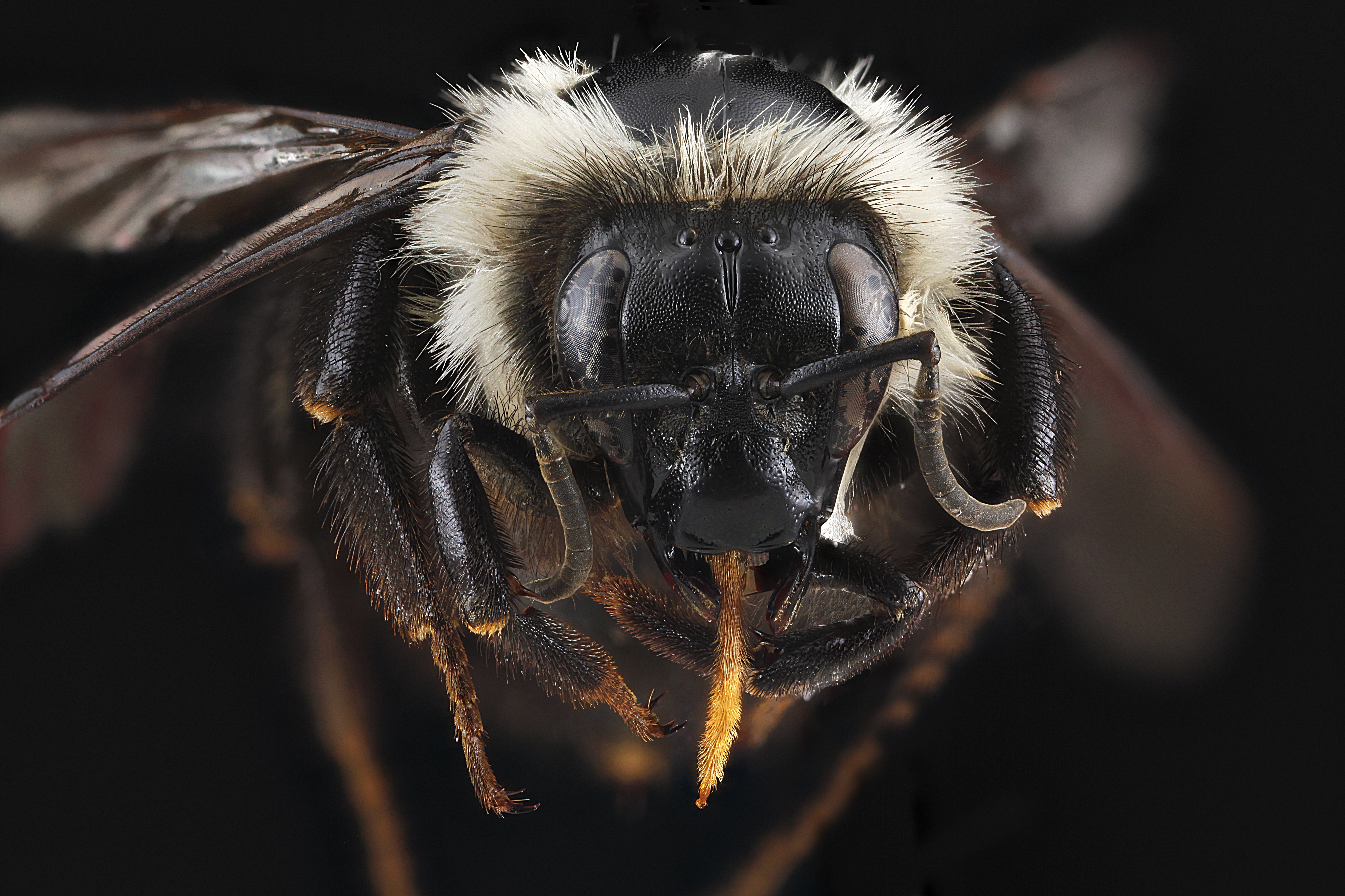 Bombus bimaculatus, female